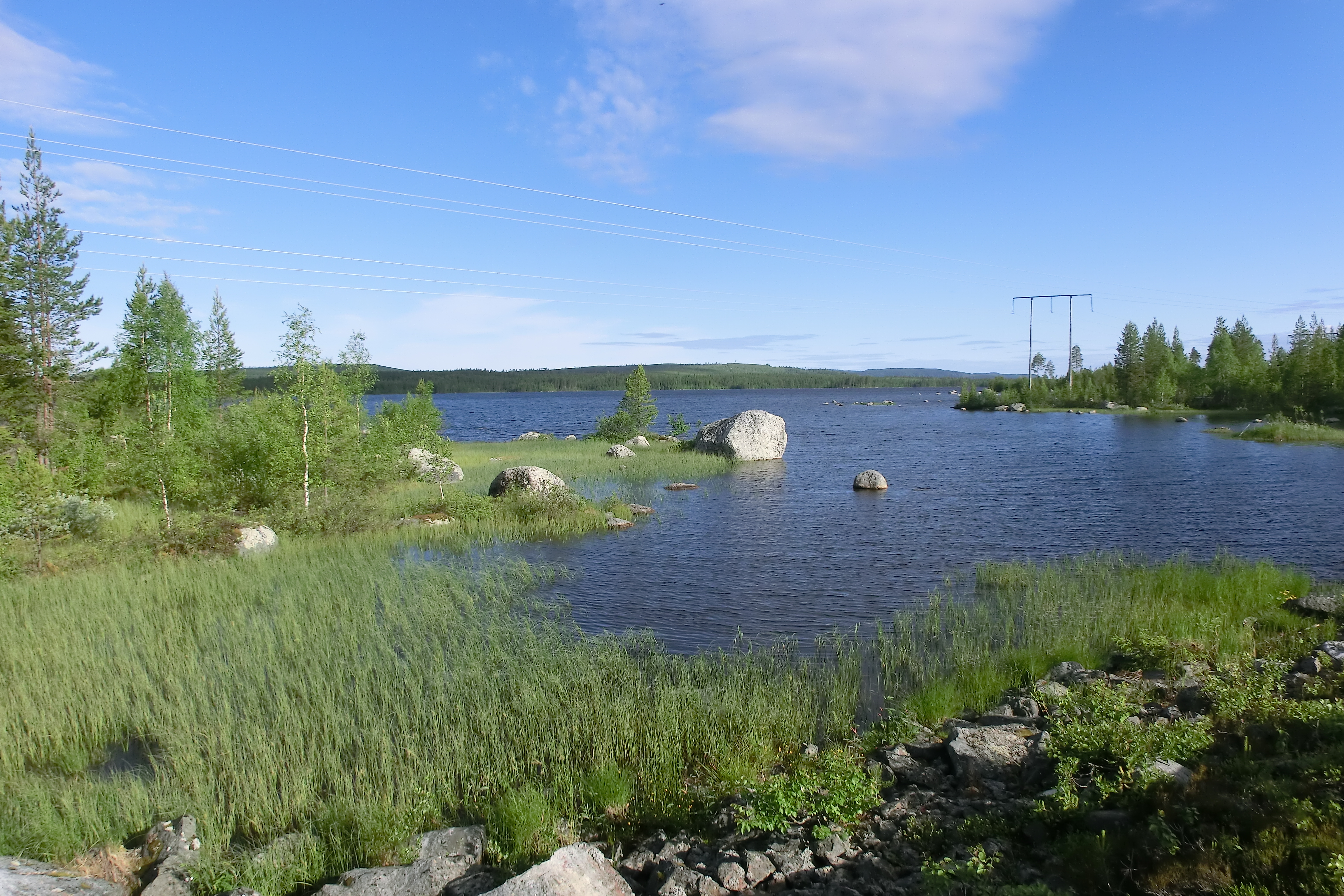 Hällbymagasinet